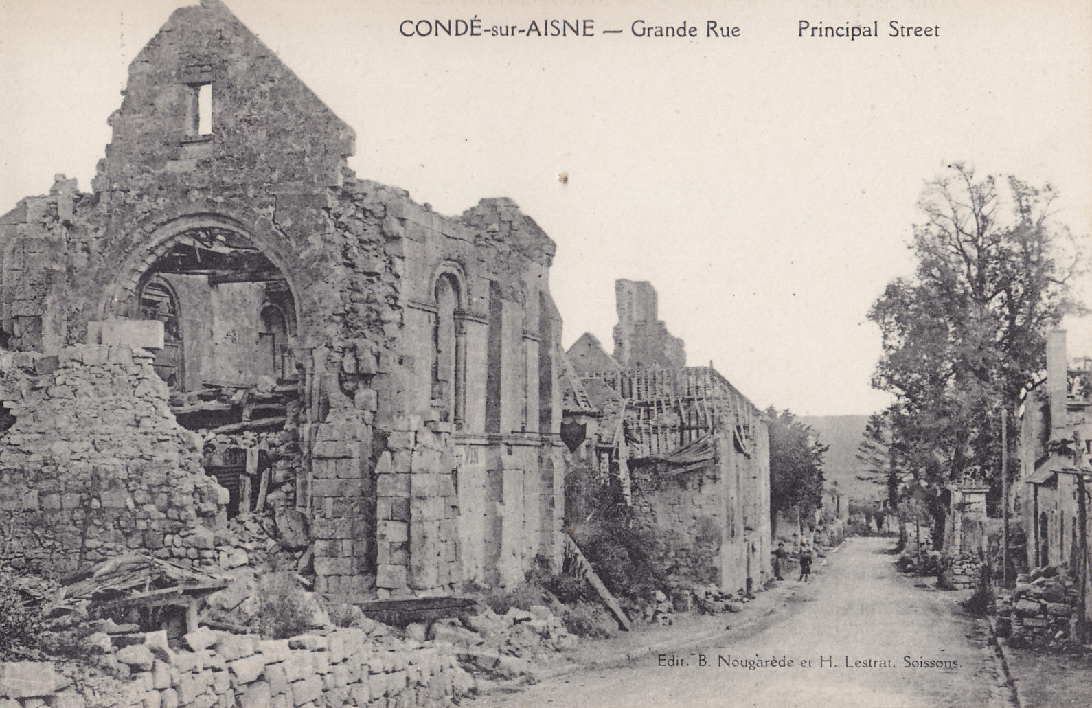 Carte postale ancienne éditée par B. Nougarède et H. Lestrat à Soissons :CONDE-sur-AISNE - Grande Rue